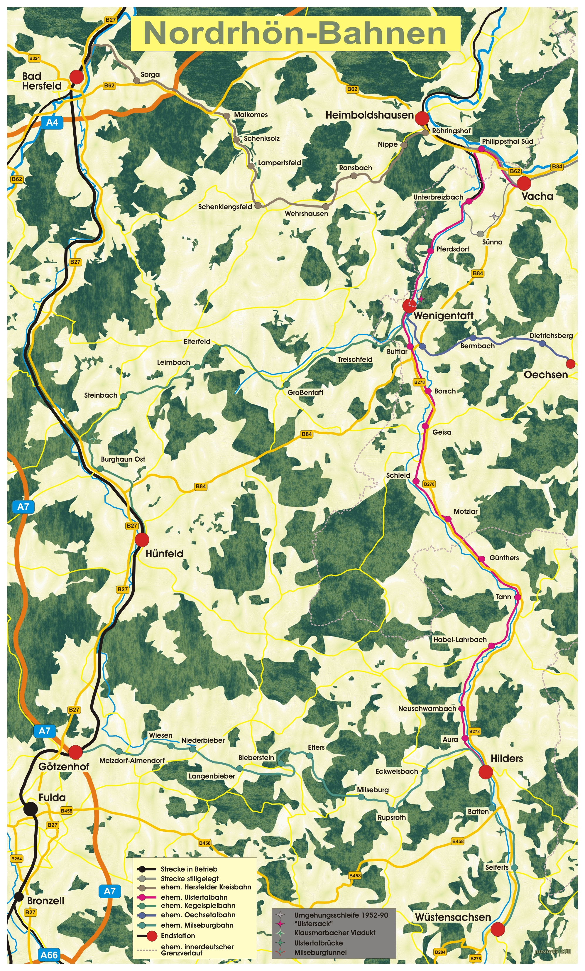 Übersichtskarte Streckenverläufe der ehemaligen Bahnstrecken in der Nordrhön (Ulstertalbahn, Bad Hersfelder Kreisbahn, Götzenhof-Wüstensachsen, Hünfeld-Wenigentaft und Wenigentaft-Oechsen)